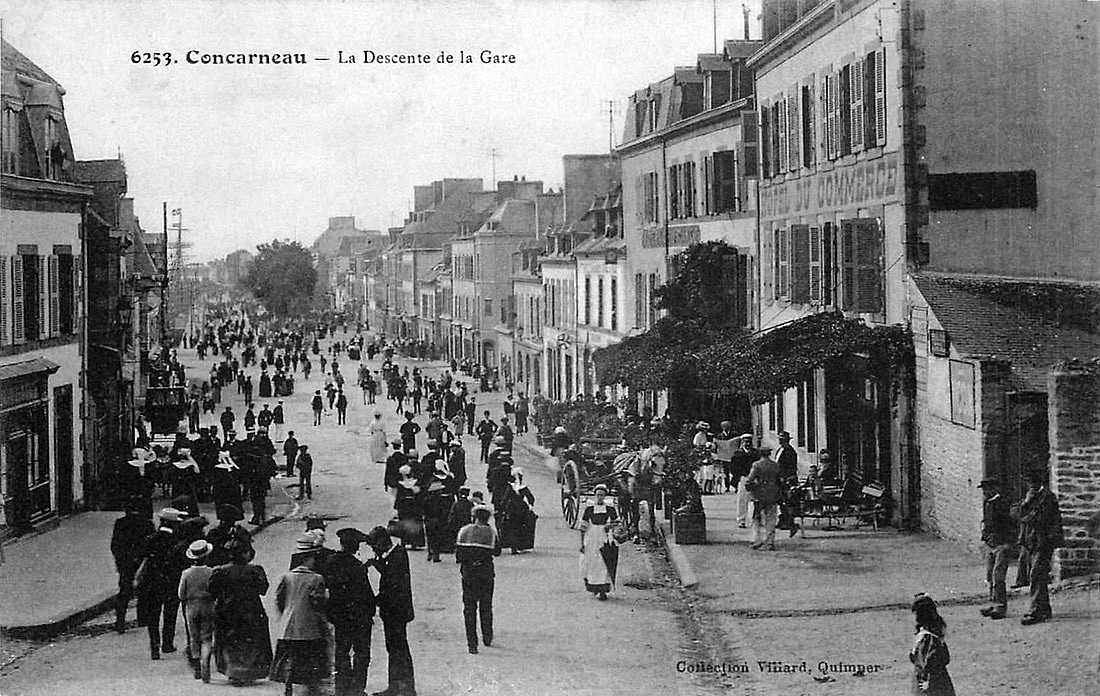 Vers 1900 à Concarneau, les voyageurs arrivés avec le dernier train descendent la rue de la gare pour rejoindre le centre-ville et le port.